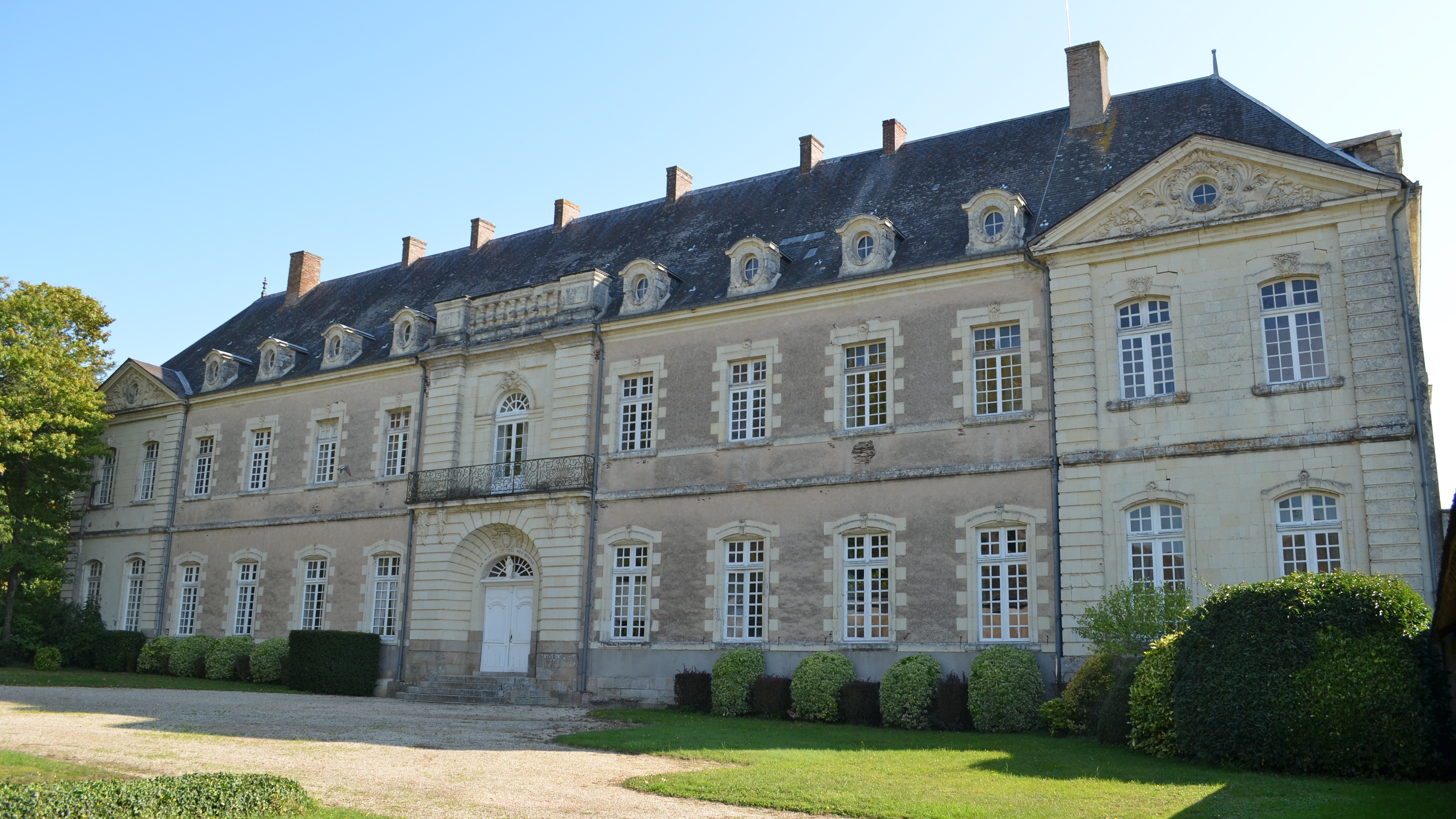 Abbaye Notre-Dame de Melleray - La Meilleraye-de-Bretagne (Loire-Atlantique) This building is en partie classé, en partie inscrit au titre des Monuments Historiques. .